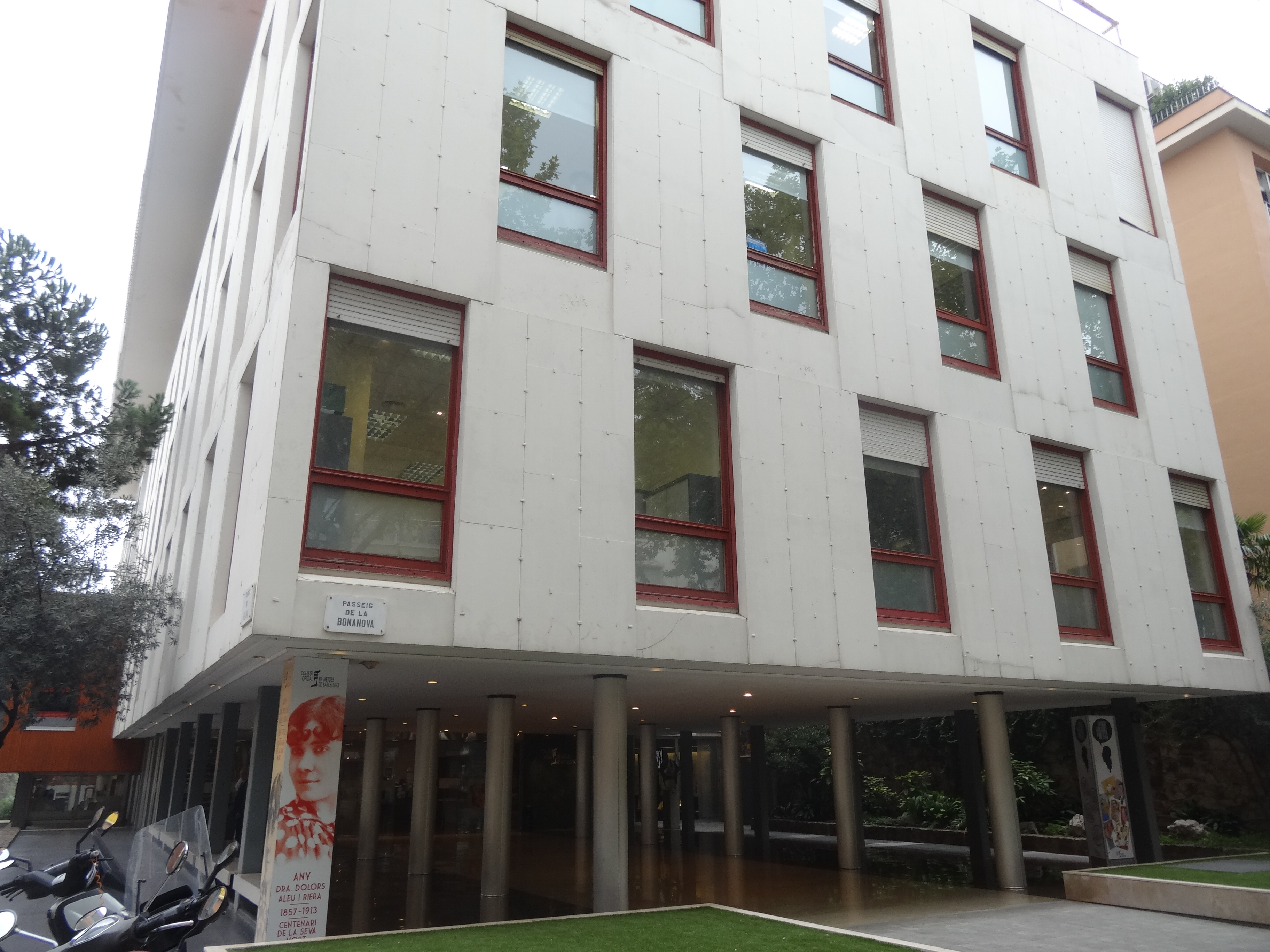 Edifici del Col·legi Oficial de Metges de Barcelona al passeig de la Bonanova